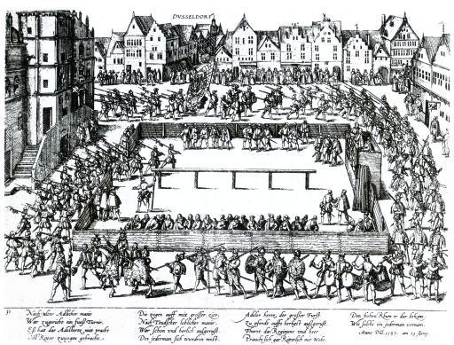 Fußturnier auf dem Marktplatz Düsseldorf anlässlich der Hochzeit von Johann Wilhelm von Jülich-Kleve-Berg mit Markgräfin Jakobe von Baden 1585.